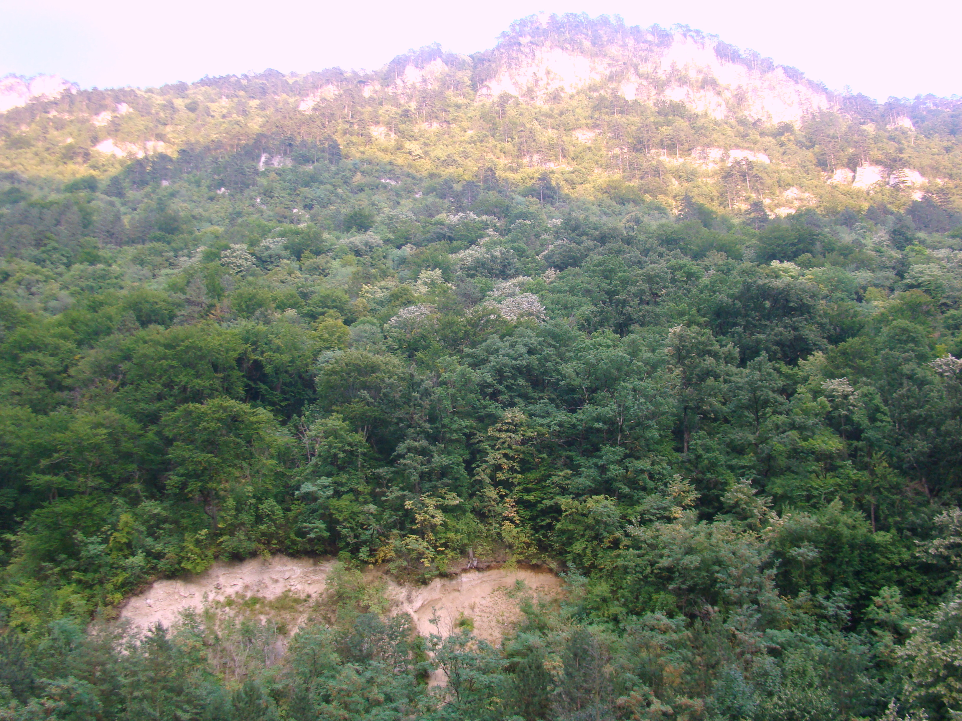 Muntele Domogled, judeţul Caraş-Severin